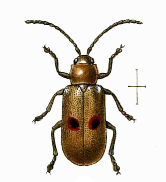 Nuevas especies de Galerucinæ. Viasta dorsal